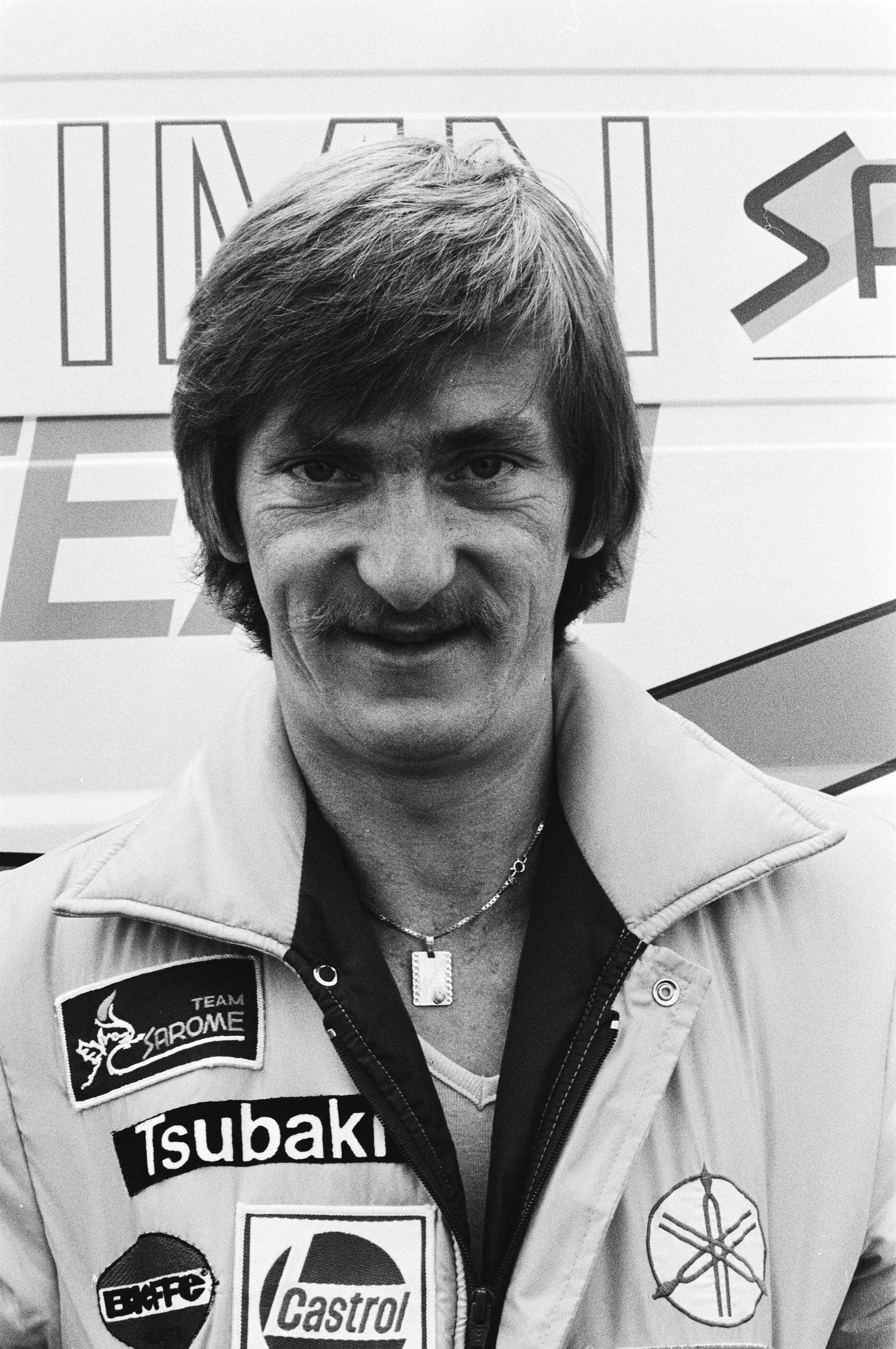 Collectie / Archief : Fotocollectie Anefo Reportage / Serie : [ onbekend ] Beschrijving : Training TT van Assen; Jack Middelburg , kop Datum : 26 juni 1980 Locatie : Assen Trefwoorden : motoren Persoonsnaam : Jack Middelburg Fotograaf : Pereira, Fernando / Anefo Auteursrechthebbende : Nationaal Archief Materiaalsoort : Negatief (zwart/wit) Nummer archiefinventaris : bekijk toegang 2.24.01.05 Bestanddeelnummer : 930-8989